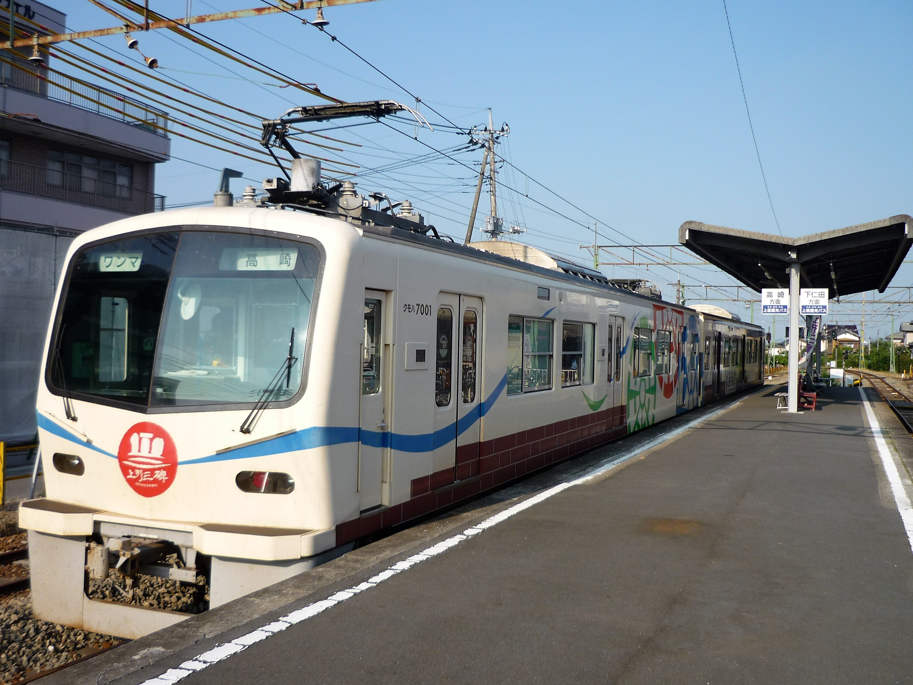 吉井駅に停車中の上信電鉄クモハ7001（手前） Panasonic Lumix DMC-FS3